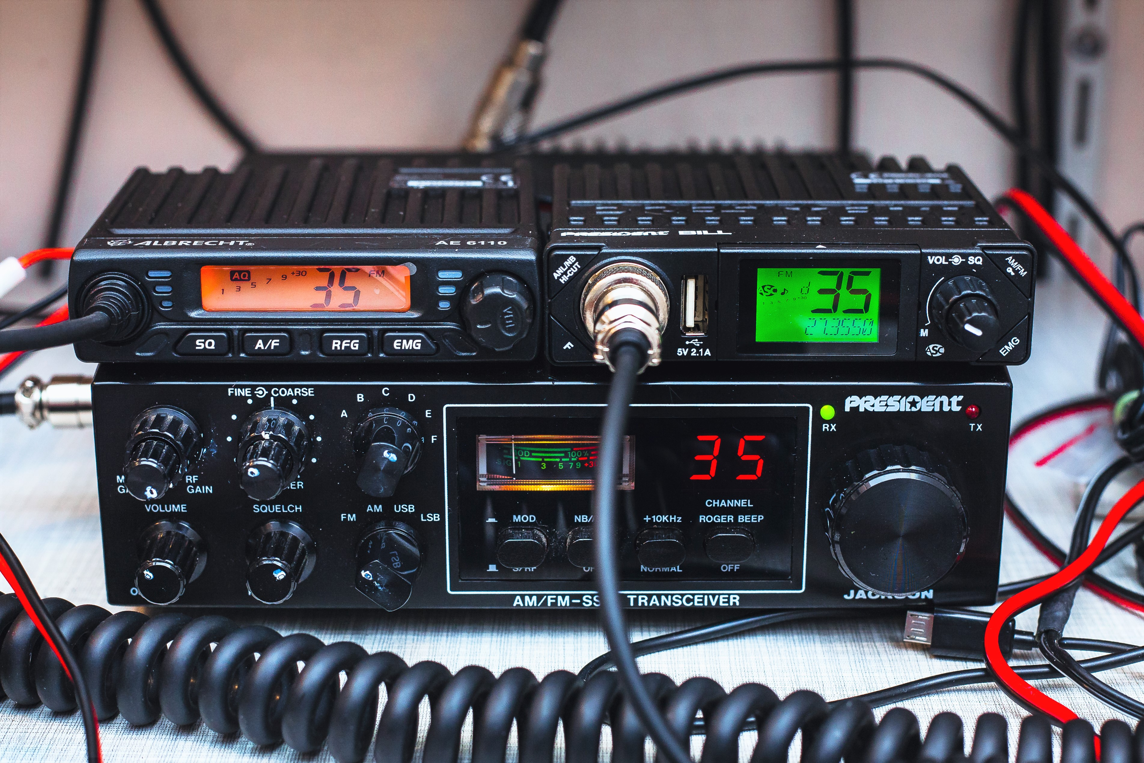 Oben zwei moderene CB-Mobilfunkgeräte, unten ein Exportfunkgerät aus den 80er Jahren mit SSB.